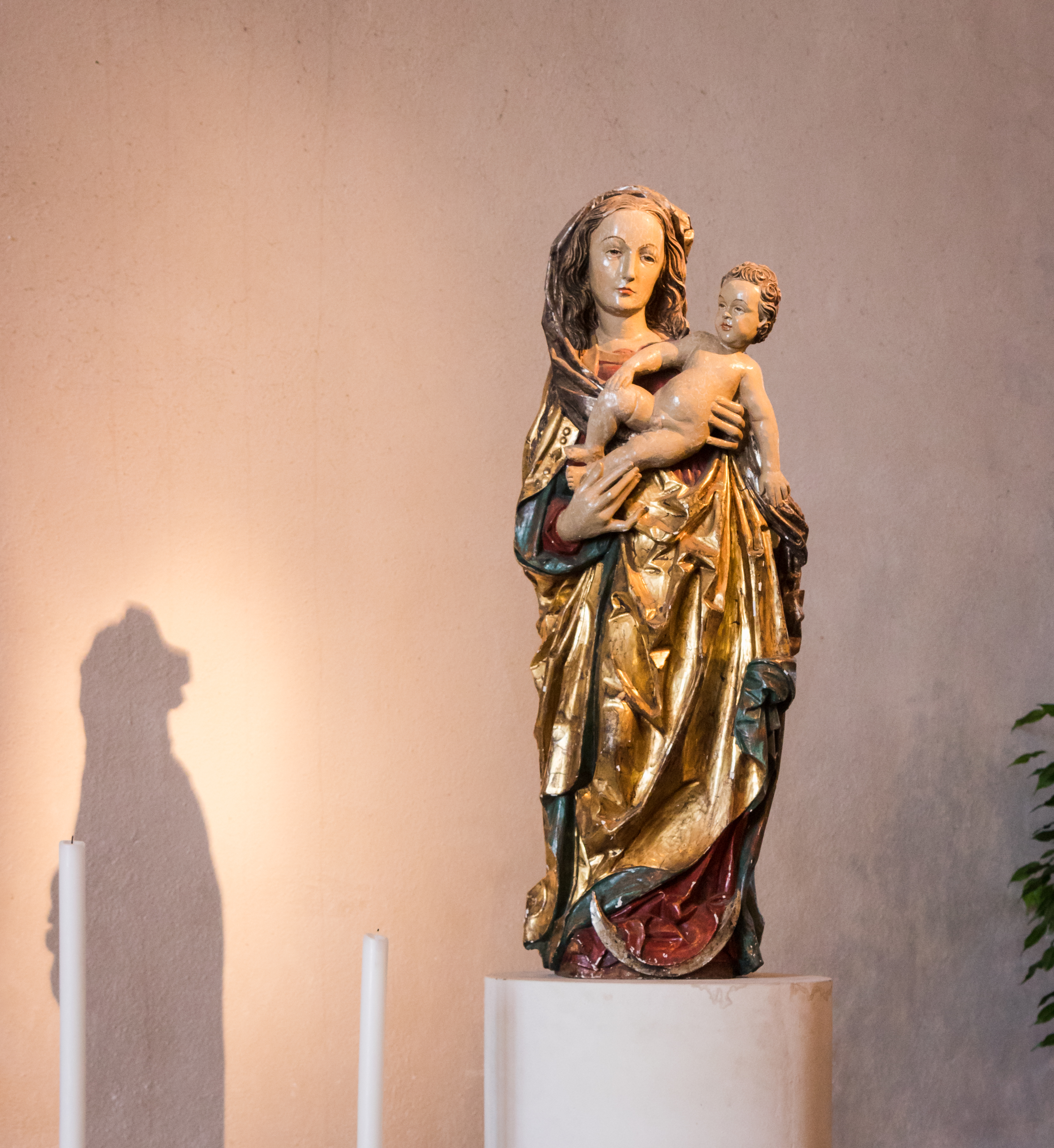 St. Joseph in Köln-Rodenkirchen, Architekt: Dominikus und Gottfried Böhm. Kopie einer Riemenschneider-Madonna, früher in der Marienkapelle aufgestellt